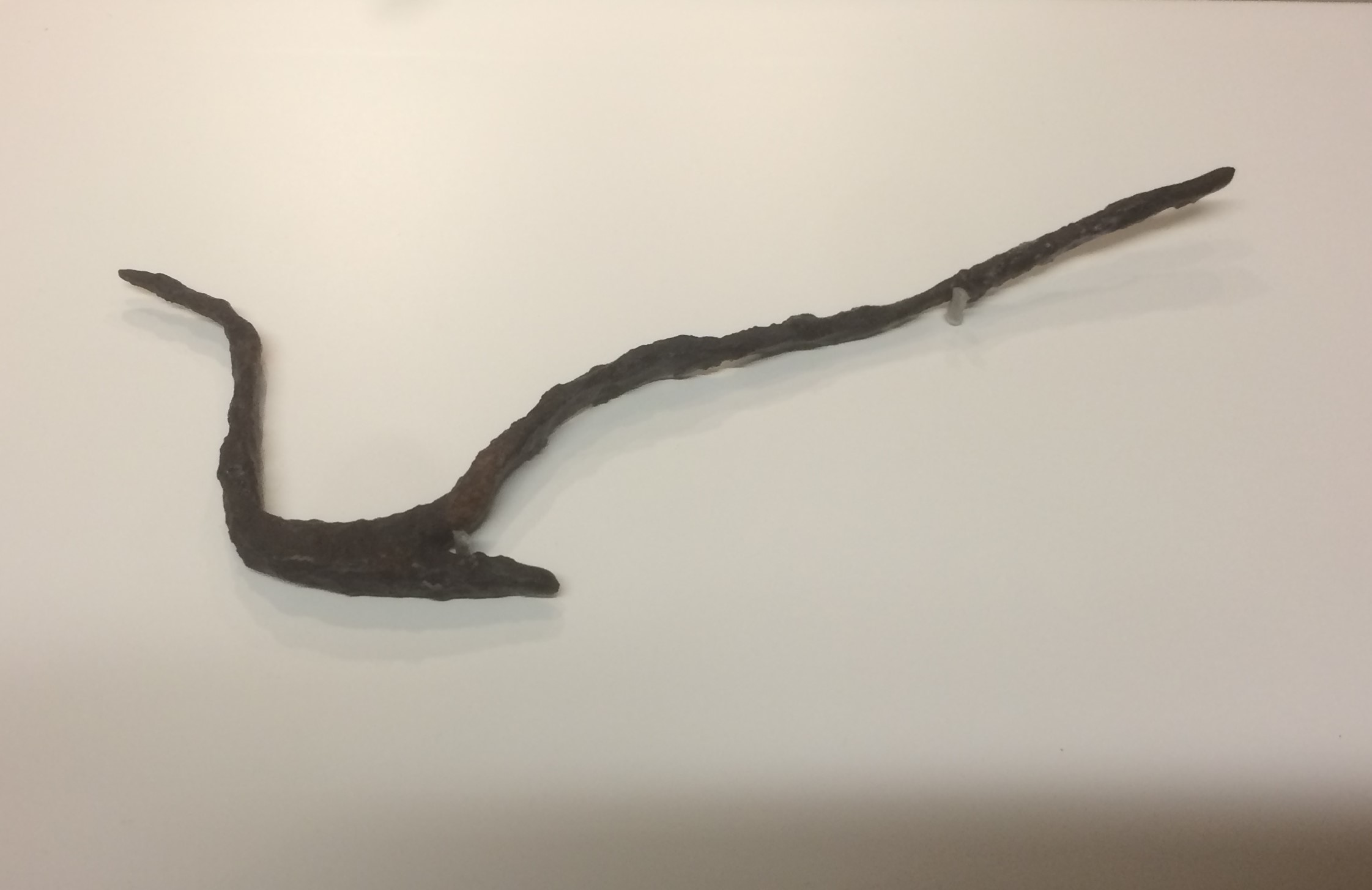 Arado votivo expuesto en el Museu de Prehistoria de Valencia